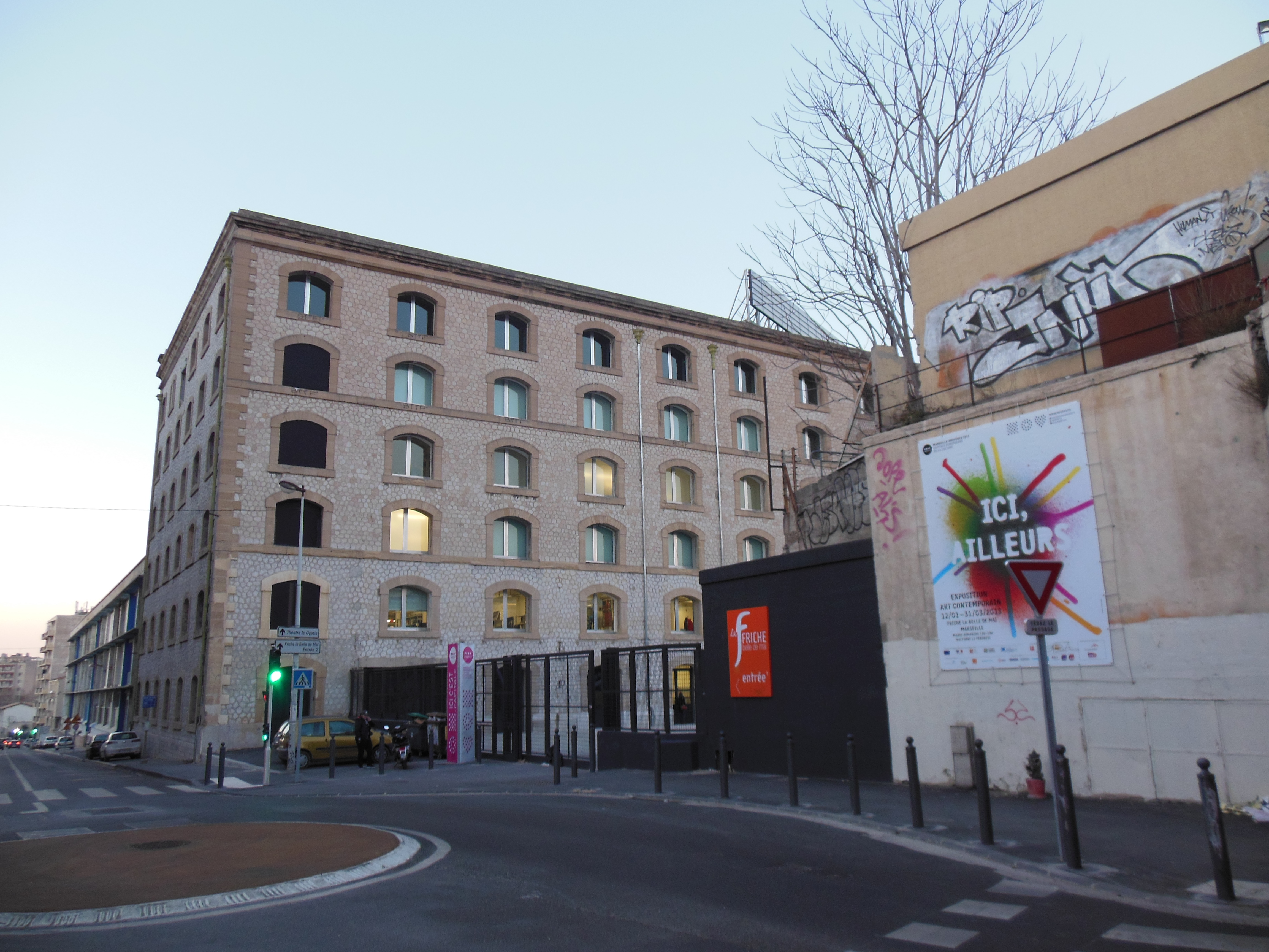 Entrée principale de la Friche Belle de Mai, 41 rue Jobin, Marseille